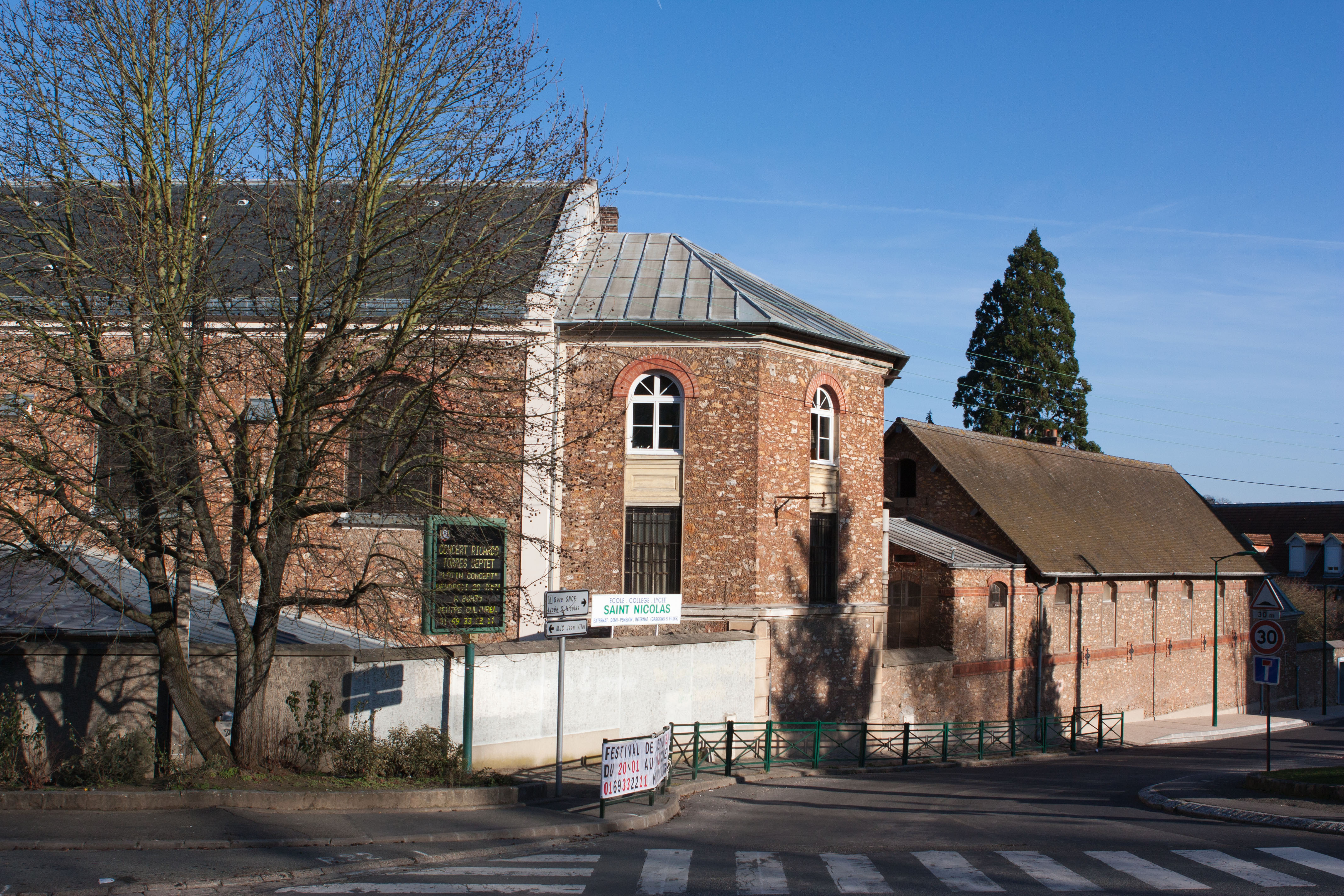 Ecole-St-Nicolas, Igny, Essonne, France